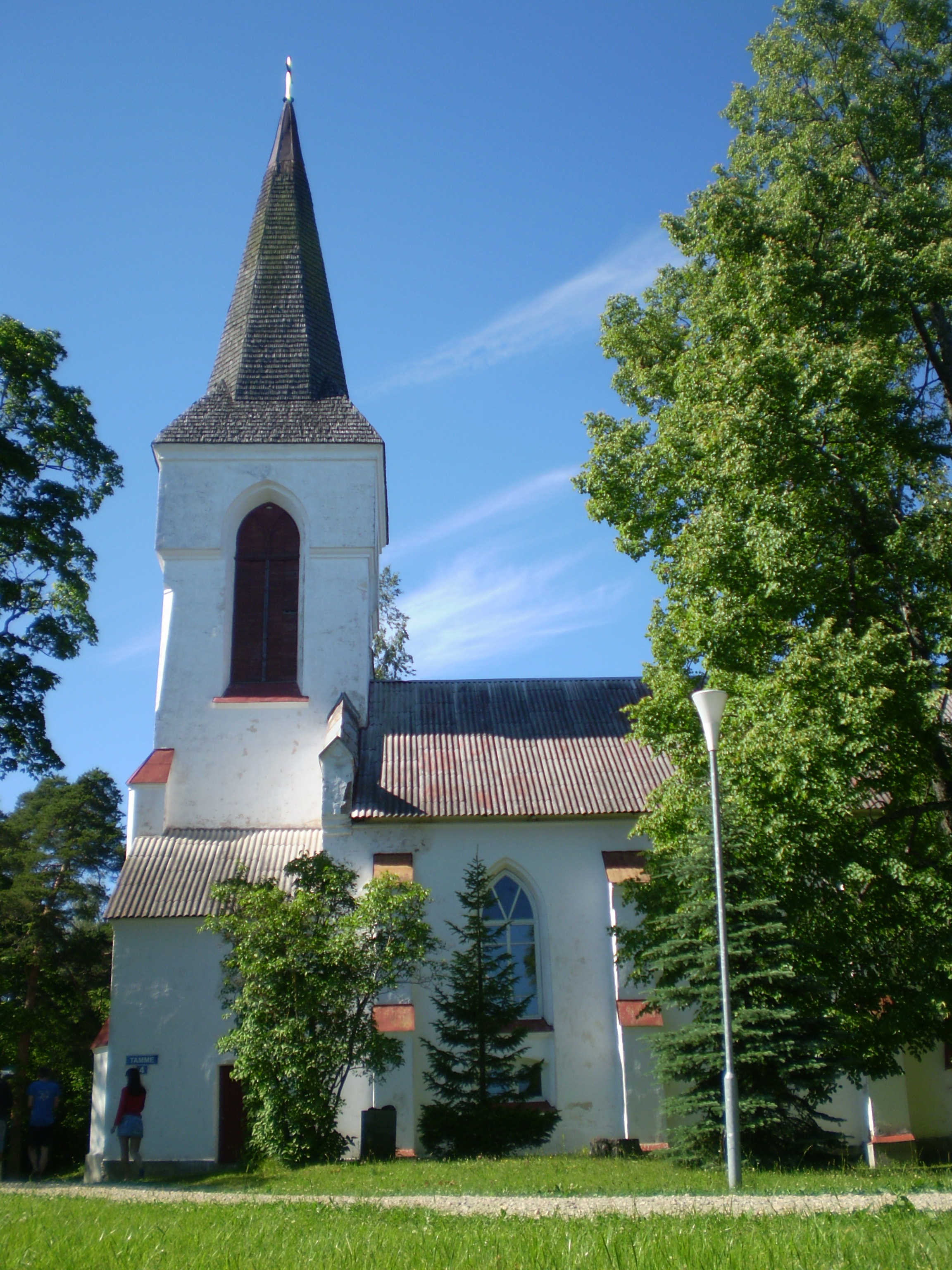 Iisaku kirik 1894-1896